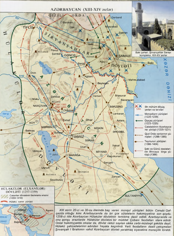 Azərbaycan XIII-XIV əsrlərdə